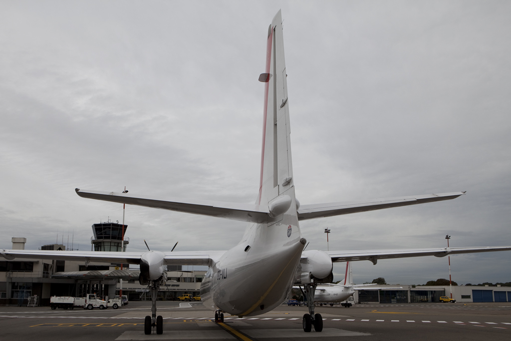 Antwerpen apron